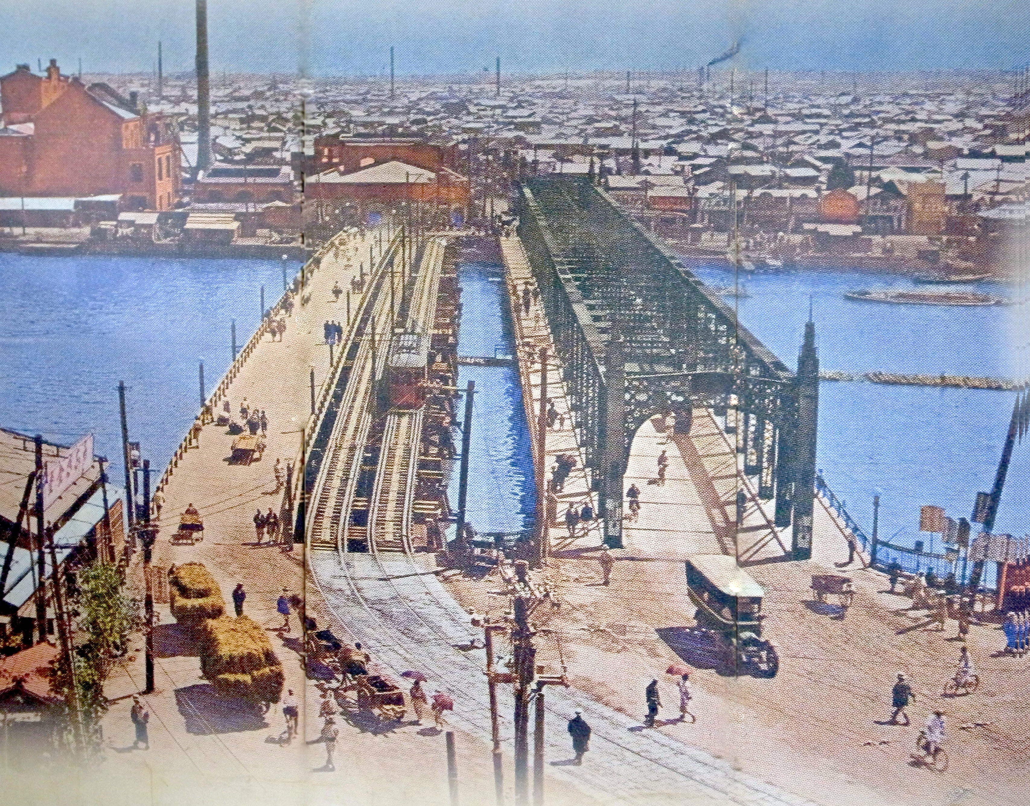 Azuma Bridge, Sumida River (吾妻橋（あづまばし）は、隅田川にかかる橋)